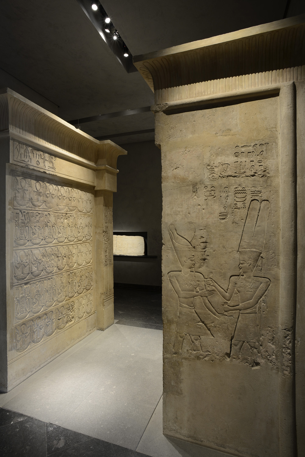 L'une des portes de Médamoud. Édifiée sous Ptolémée IV, vers 221-205 avant J.-C. Grès H. 380 ; l. 360 ; P. 300 cm. Don de l'Institut d'archéologie orientale en 1938. Inv. 1939-29 Musée des Beaux-Arts de Lyon. A l'origine, cette porte monumentale marquait une entrée du principal sanctuaire de Médamoud. Cette vue présente l'extrémité de la porte tournée vers l'intérieur du temple. Ici, le roi coiffé du pschent, reçoit d’Amon (coiffé de deux grandes plumes) le khepesh (cimeterre à tête de bélier, symbole de la victoire, mais dont la lame a disparu ici), destiné à sa lutte contre les ennemis du dieu et de l’Égypte, et l’étui-mekes (contenant un papyrus), symbole de la transmission du pouvoir divin. Le passage est simplement décoré de deux frises alternées de signes monumentaux symbolisant la longévité du règne. Sur les montants de la façade extérieure, le décor symétrique et complémentaire figure la scène classique du roi s'adressant à la divinité avant de pénétrer dans le temple. A gauche, coiffé de la couronne rouge de Basse-Egypte, Ptolémée IV Philopator officie pour le Nord ; à droite, coiffé de la couronne blanche de Haute-Egypte et surmonté de la déesse-vautour Nekhbet, il répète son geste pour le Sud. Sobrement vêtu d'un pagne à queue cérémonielle, le pharaon tient la massue et la canne d'apparat dans une main. L'autre bras tendu dans le geste du discours, il s'avance vers l'intérieur de la porte à la rencontre du dieu local, le grand taureau sacré Boukhis (associé à Montou à la Basse Époque). Sous ses pieds court la dédicace de la porte. Le passage est simplement décoré de frises de signes monumentaux symbolisant la longévité du règne. Au revers, Ptolémée IV est accueilli dans le temple par les dieux tutélaires de Médamoud. Il est représenté, à droite, coiffé du pschent, recevant d'Amon le glaive à tête de bélier ; le montant gauche disparu devait se référer à Montou.